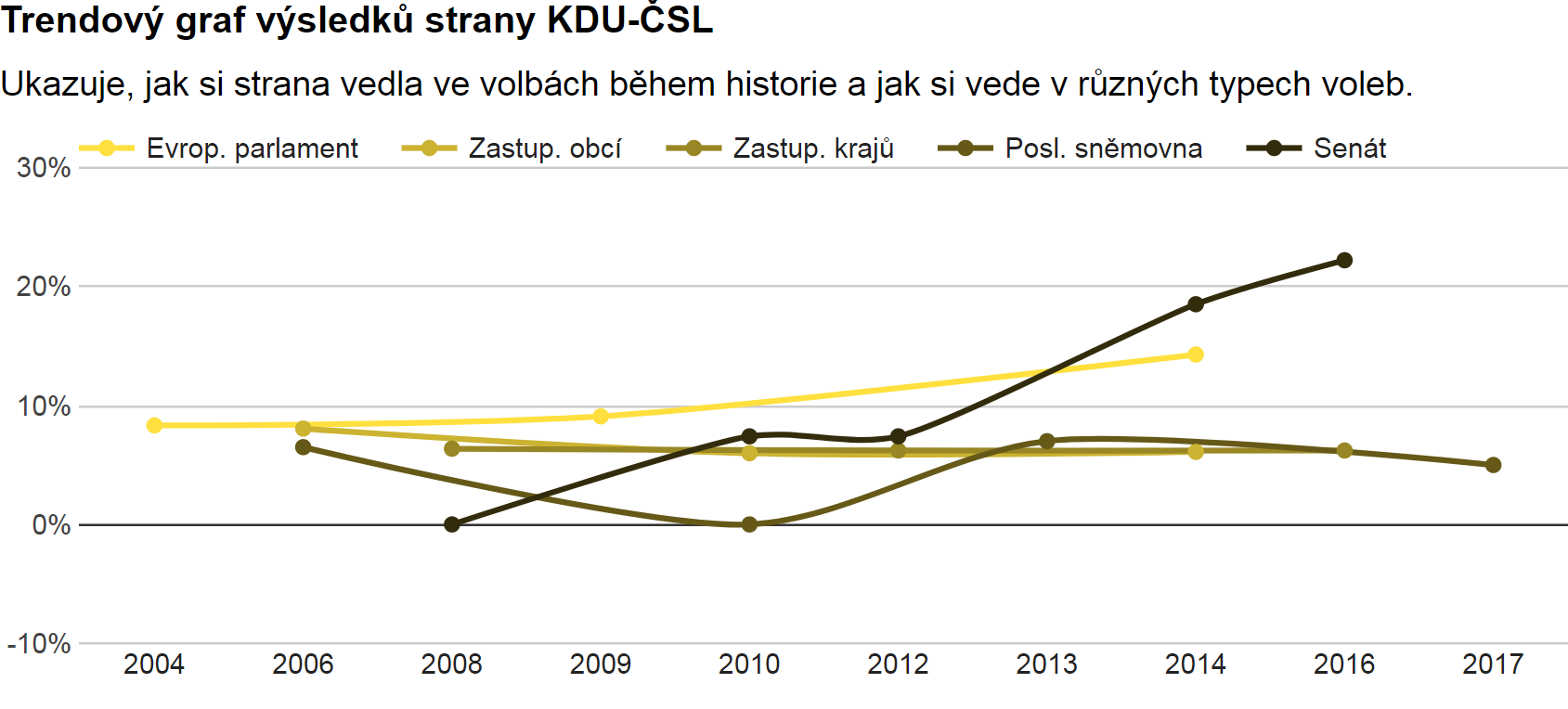 KDU-ČSL- Výsledky voleb, získané mandáty, trendy od 2004 do 2017. Poslanecká sněmovna, senát, kraje, obce, evropský parlament.